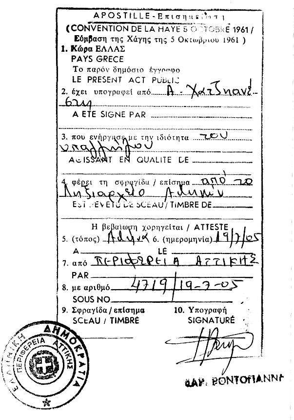 Апостиль (Греция)